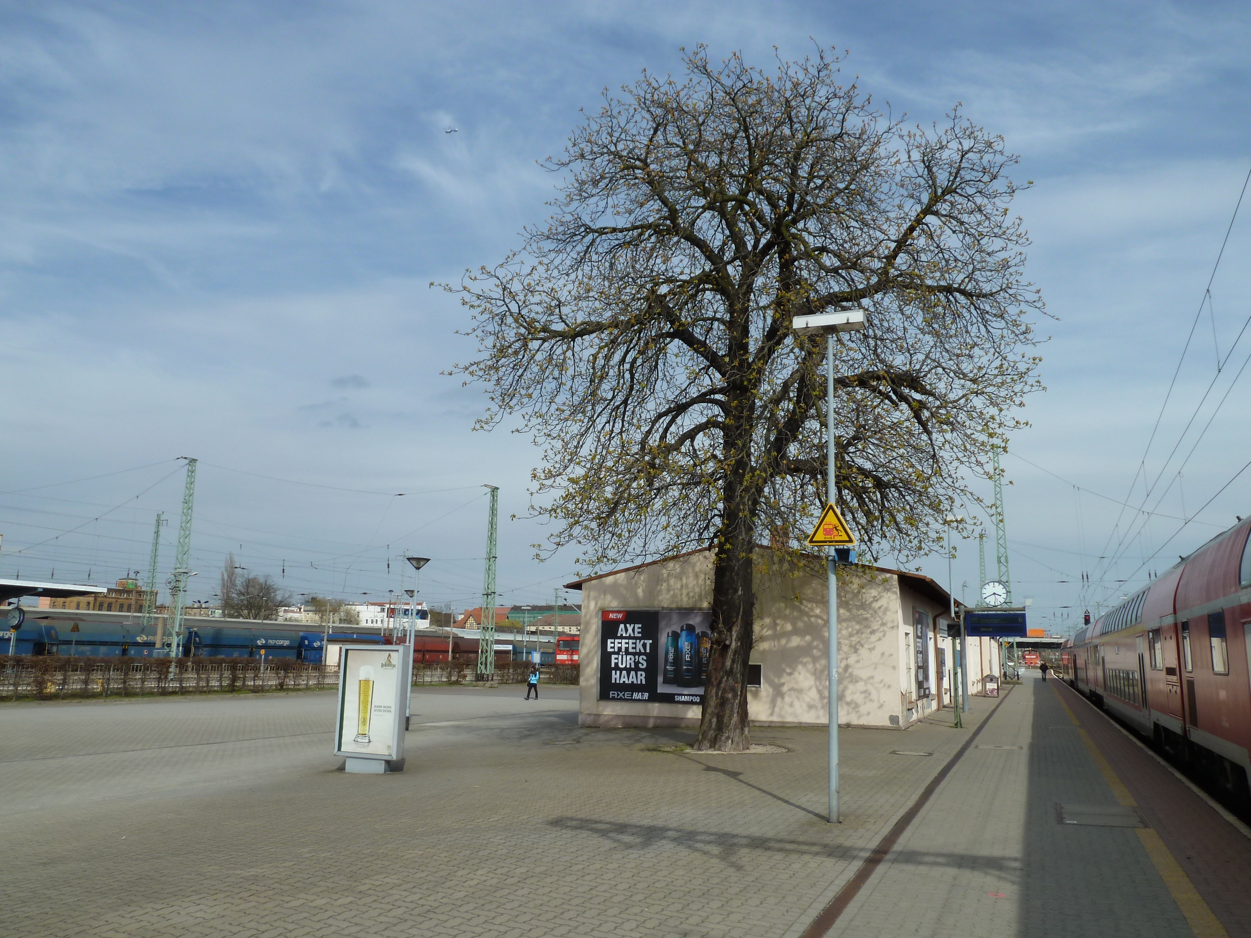 Auf der Mittelinsel zwischen den Bahnsteigen 6 und 7 stand früher das Empfangsgebäude des Cottbuser Bahnhofs